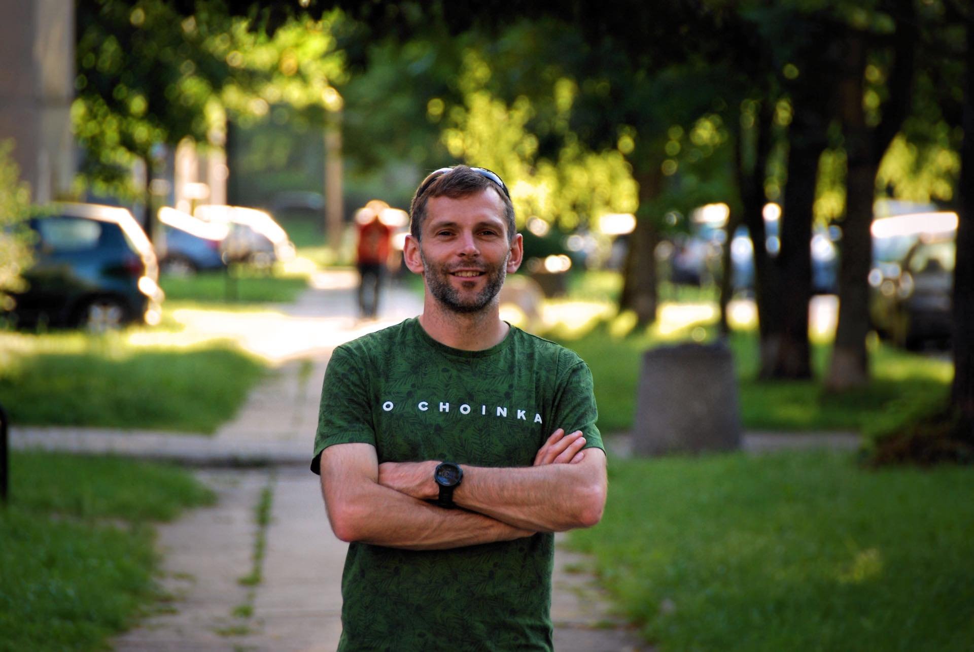 Tomasz Osmulski